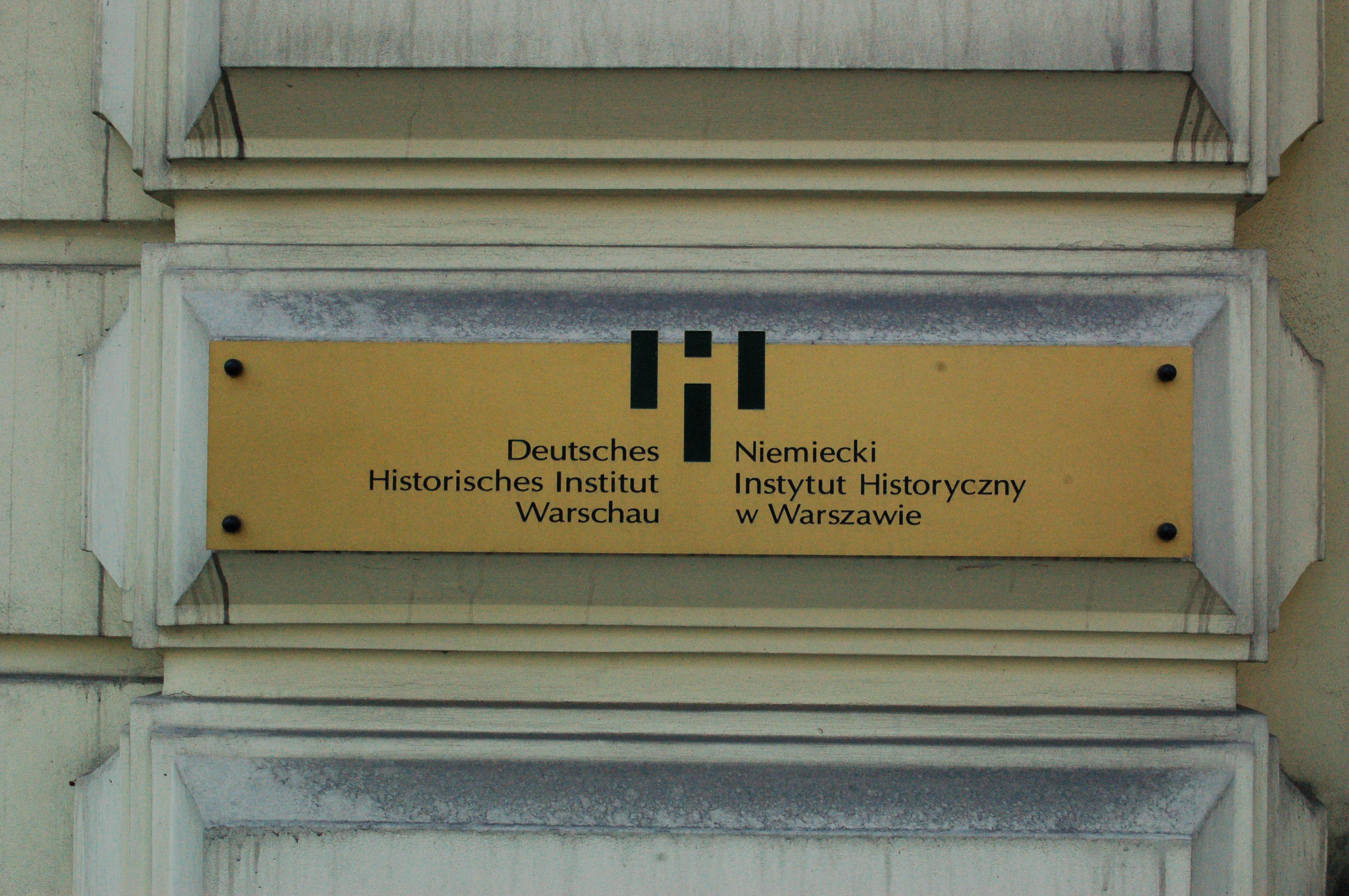 Warschau